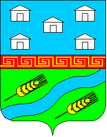 Герб Старобешево